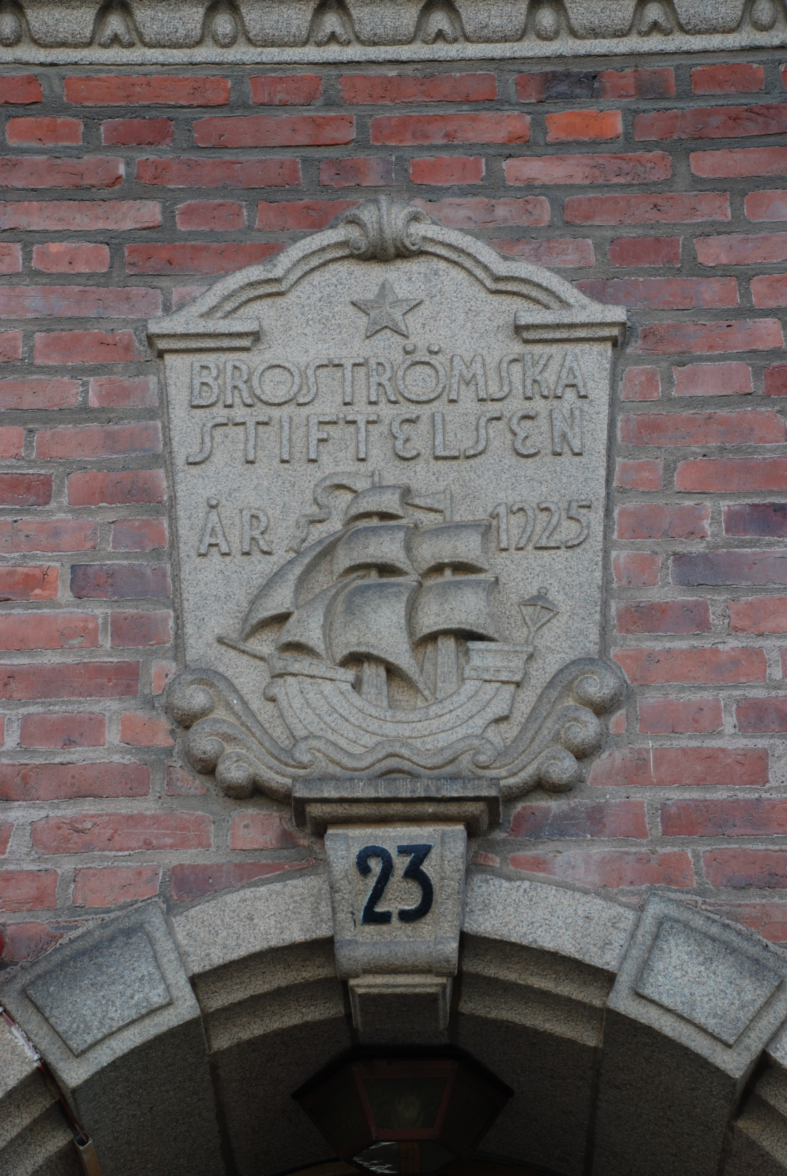 Broströmska stiftelsens hus vid Kungsladugårdsgatan i stadsdelen Kungsladugård i Göteborg. Uppförda 1925.